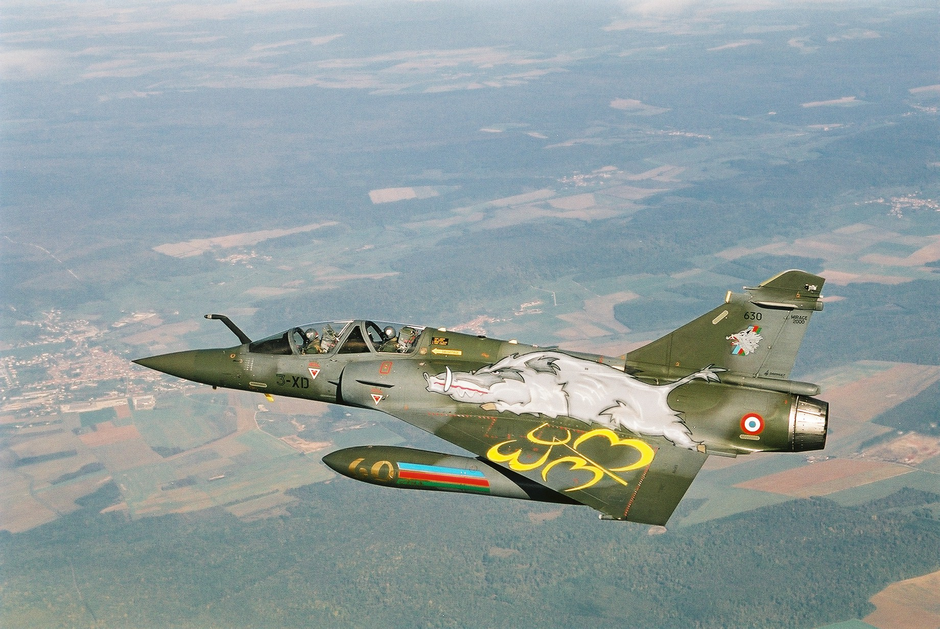 Mirage 2000 portant une livrée spéciale anniversaire